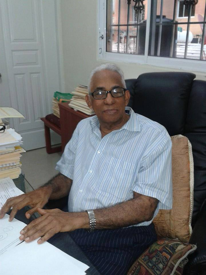 LUCIANO JUAN DE DIOS CASTILLO DOMÍNGUEZ